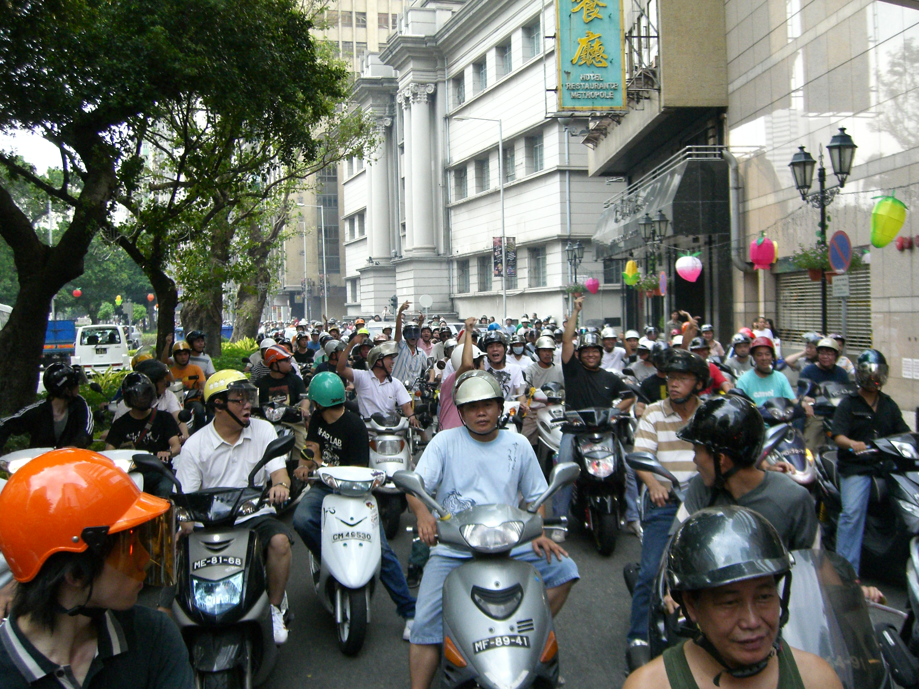 Macau 9.30 Parade